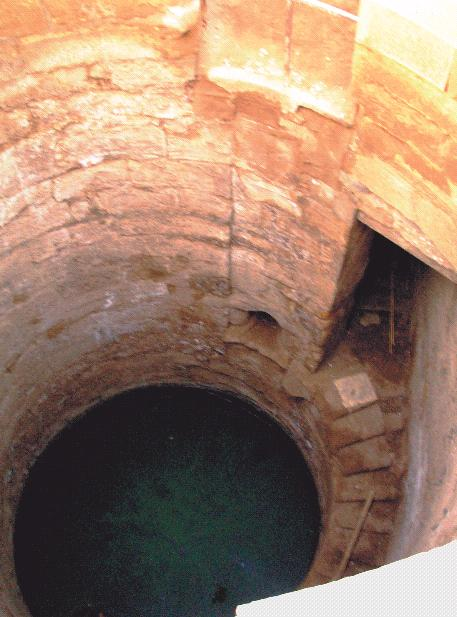 Nilometro do templo de Kom Ombo